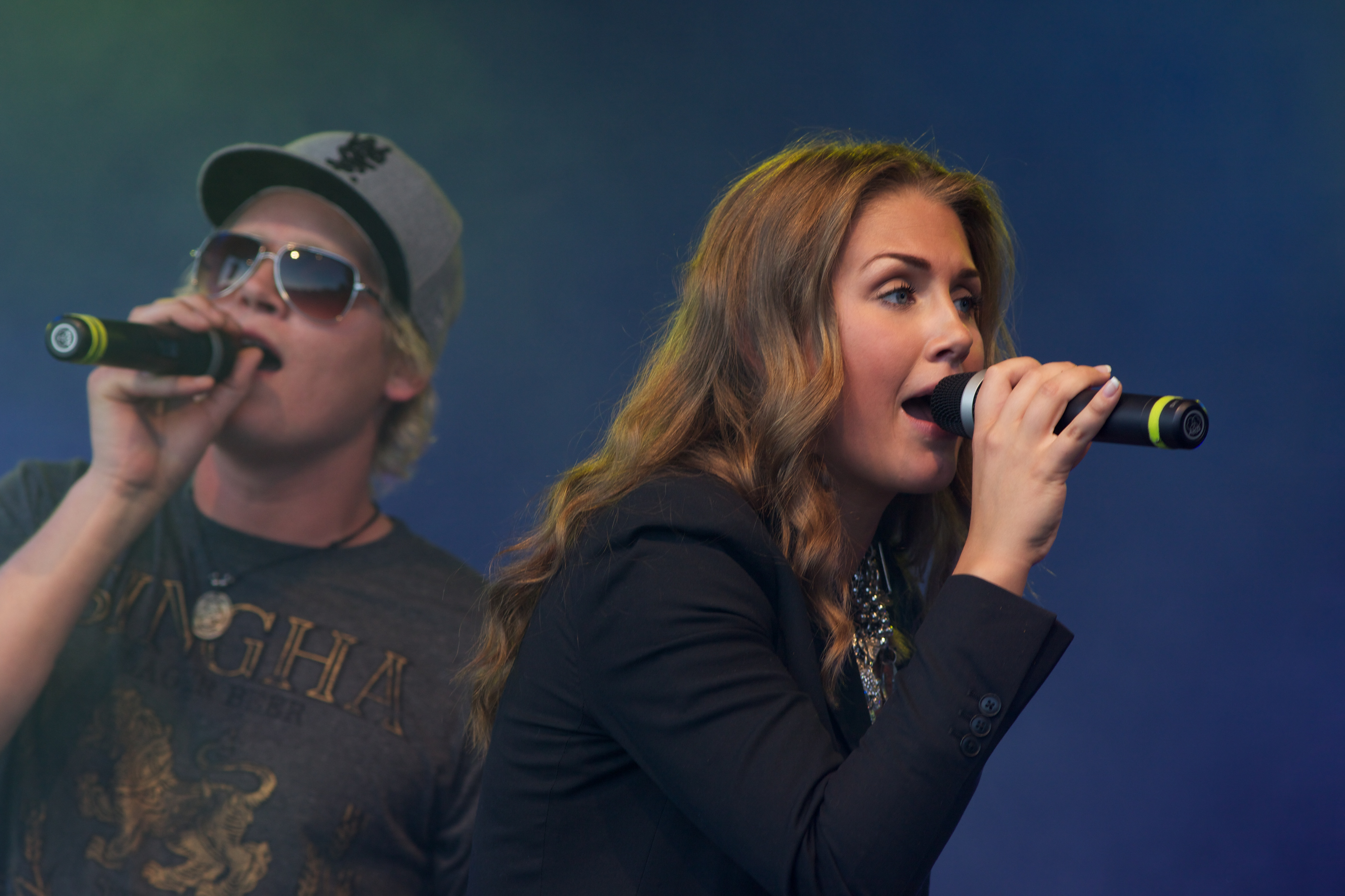 Tone Damli Aaberge og Vinni på Sluserock 2011